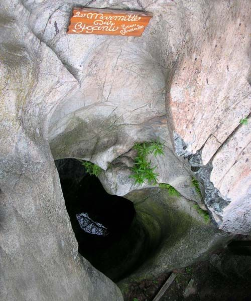 marmitta dei giganti Gouffres des Busserailles, Valtournenche